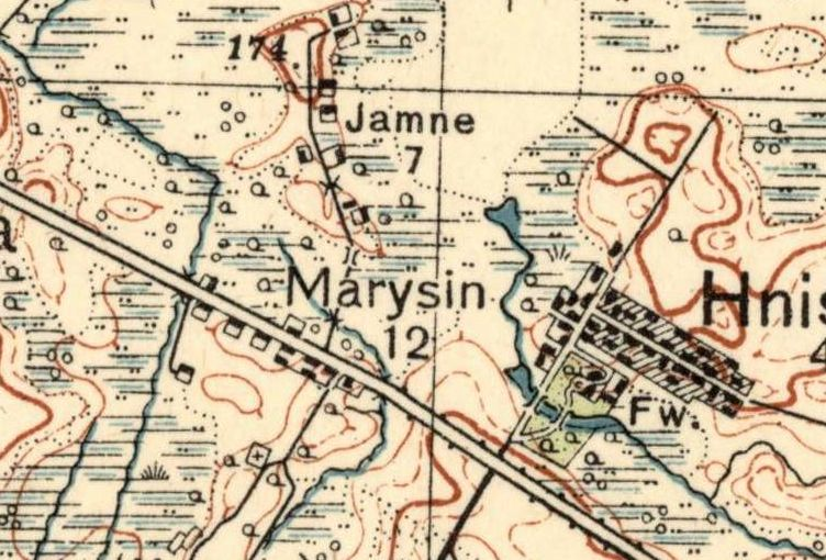 Marysin (pow. chełmski, gm. Ruda Huta) na mapie Wojskowego Instytutu Geograficznego z 1933 r.